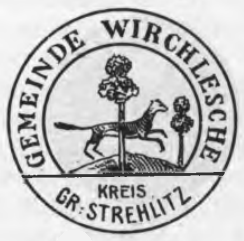 Altes Siegel bzw. Stempel der Gemeinde Wierchlesche im Kreis Groß Strehlitz.